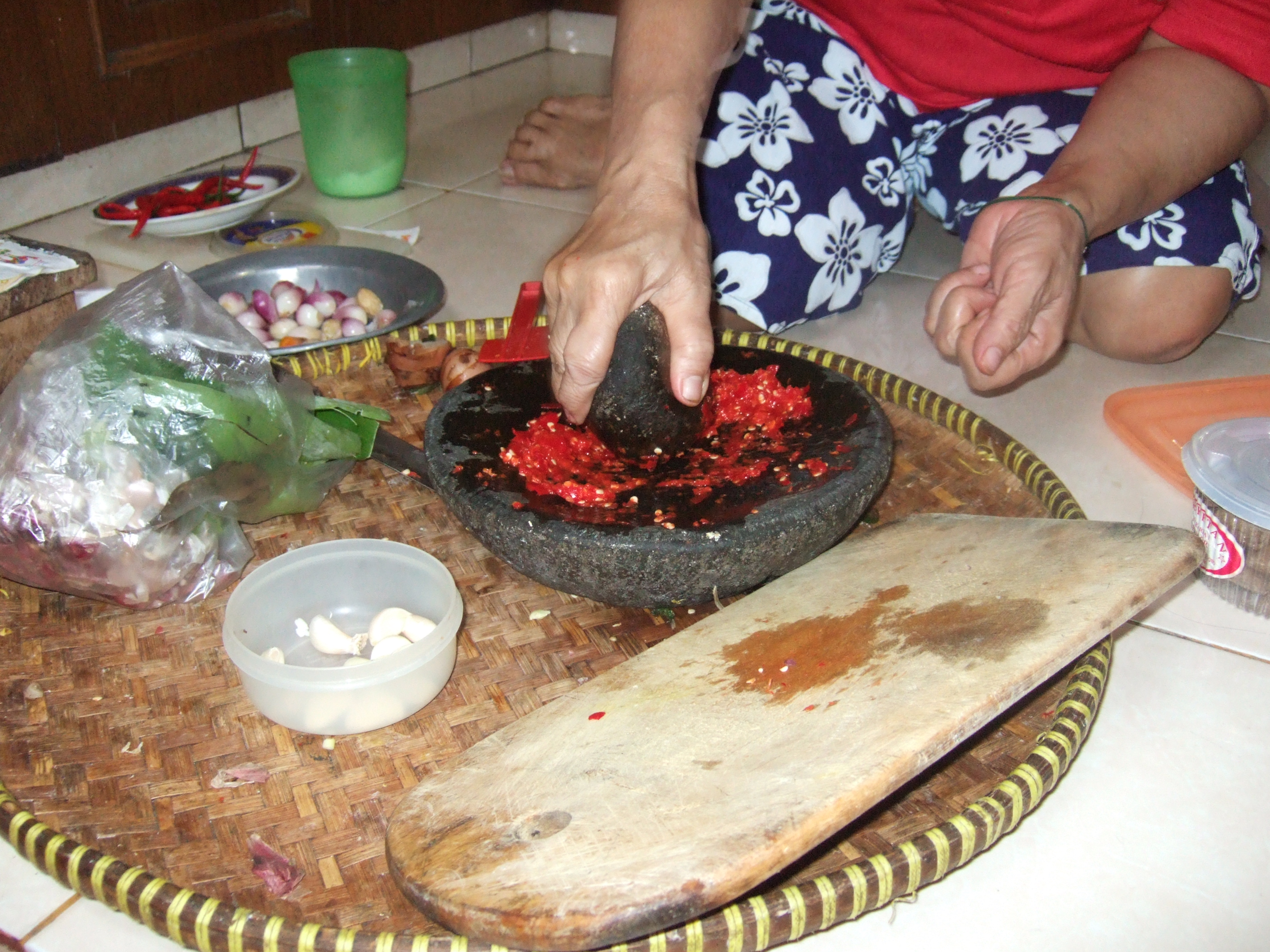 Sambal diulek di dapur.